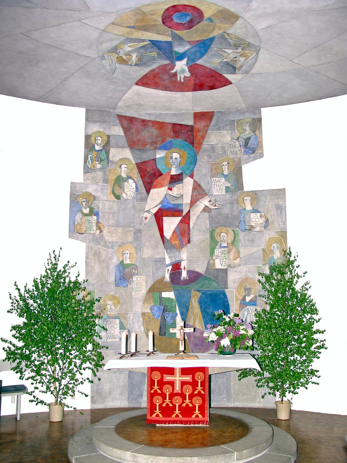 Das Wandbild hinter dem Altar der Friedenskirche in Zedtwitz von Gerd Jähnke